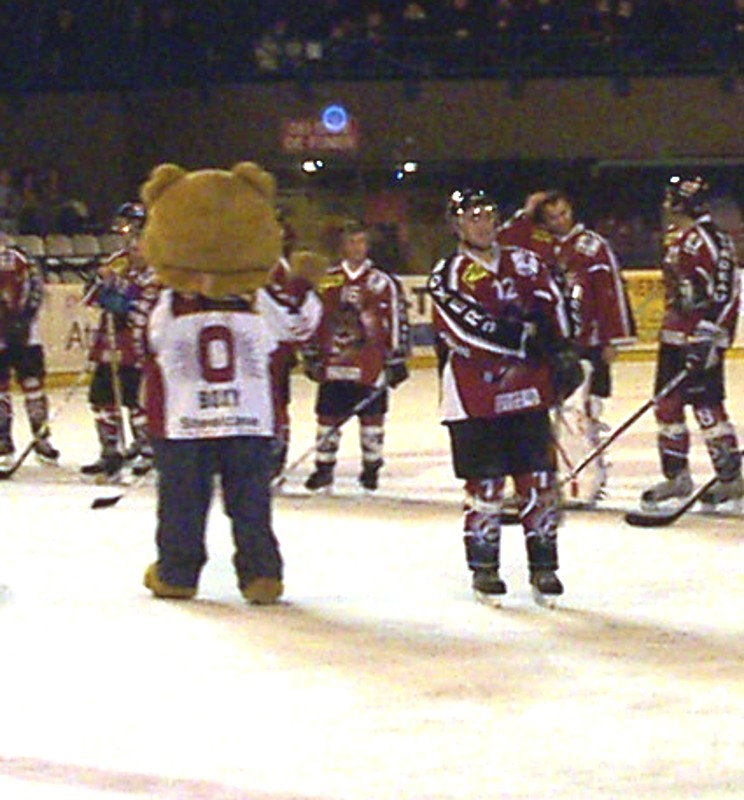 Photo de la mascotte des Boxers de Bordeaux, Boxy